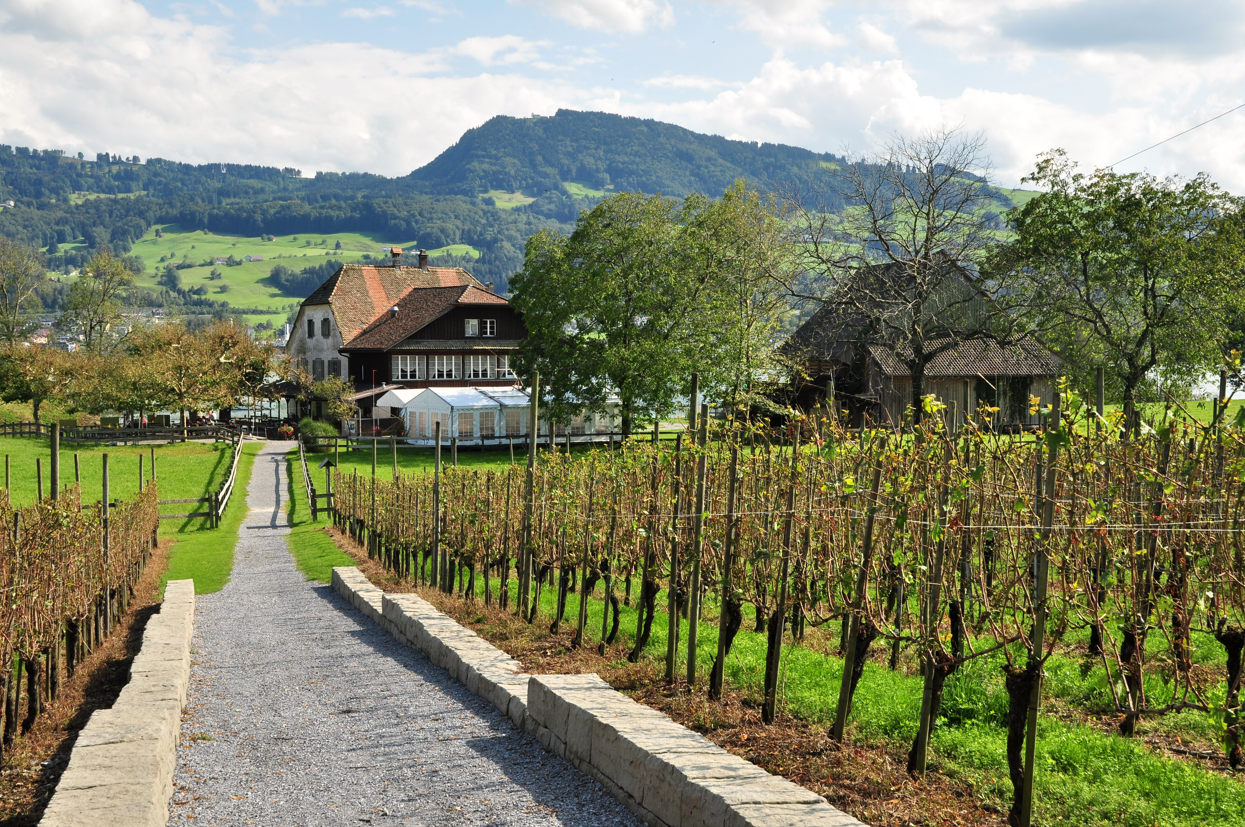 Ufenau island on Zürichsee (Lake Zürich) in Switzerland, Etzel mountain in the background.